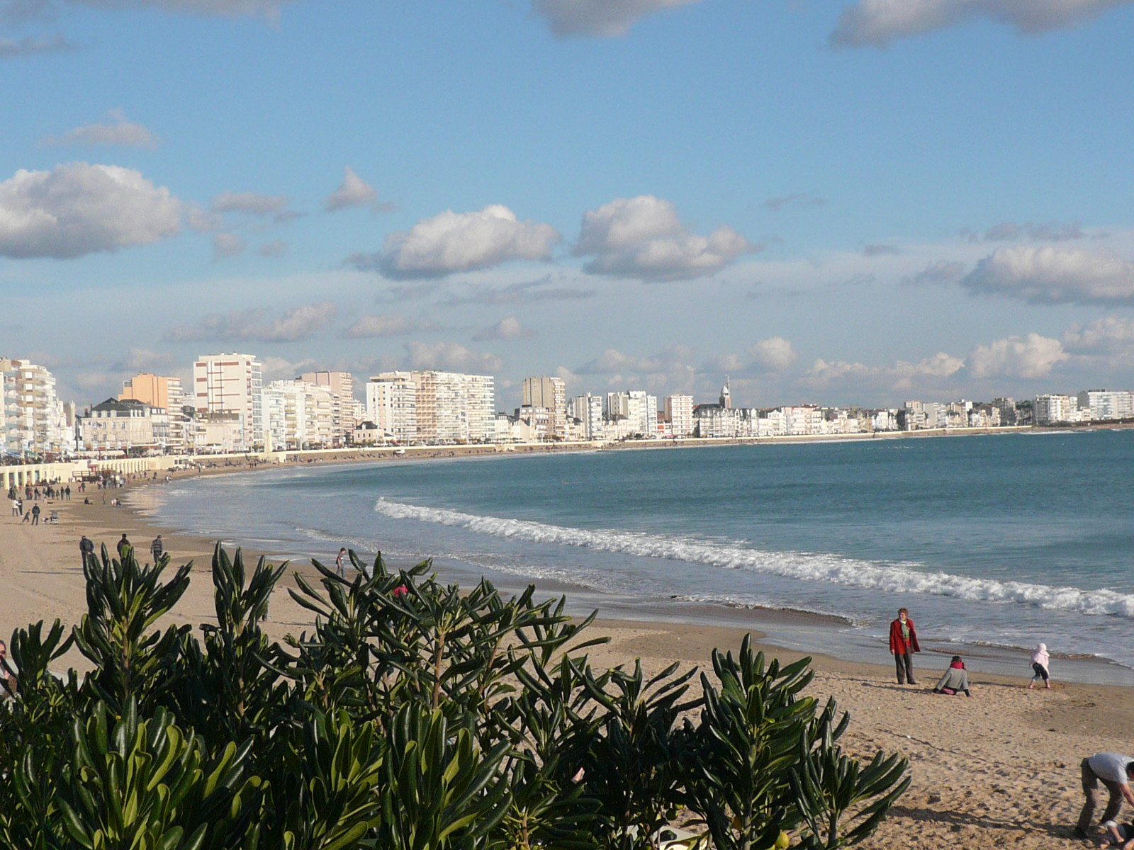 Baie des Sables d'Olonne